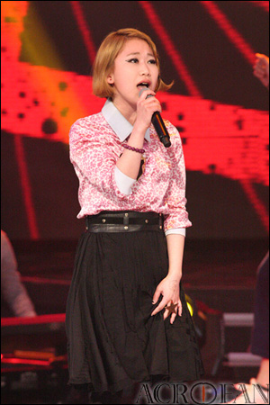 엠넷 보이스코리아 4월 20일 합격자 서면인터뷰